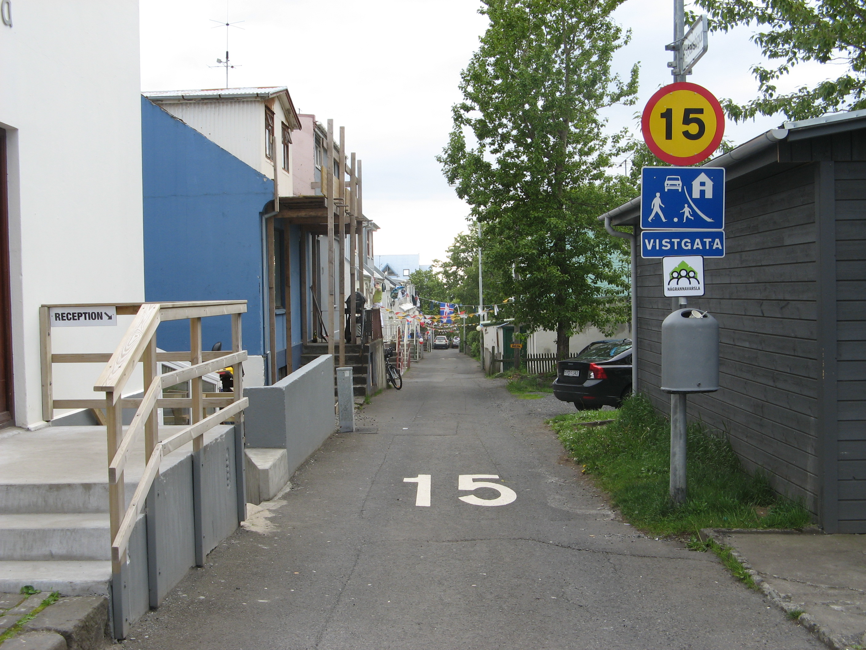 Haðarstígur, une petite rue typique dans le centre de Reykjavik, Islande.